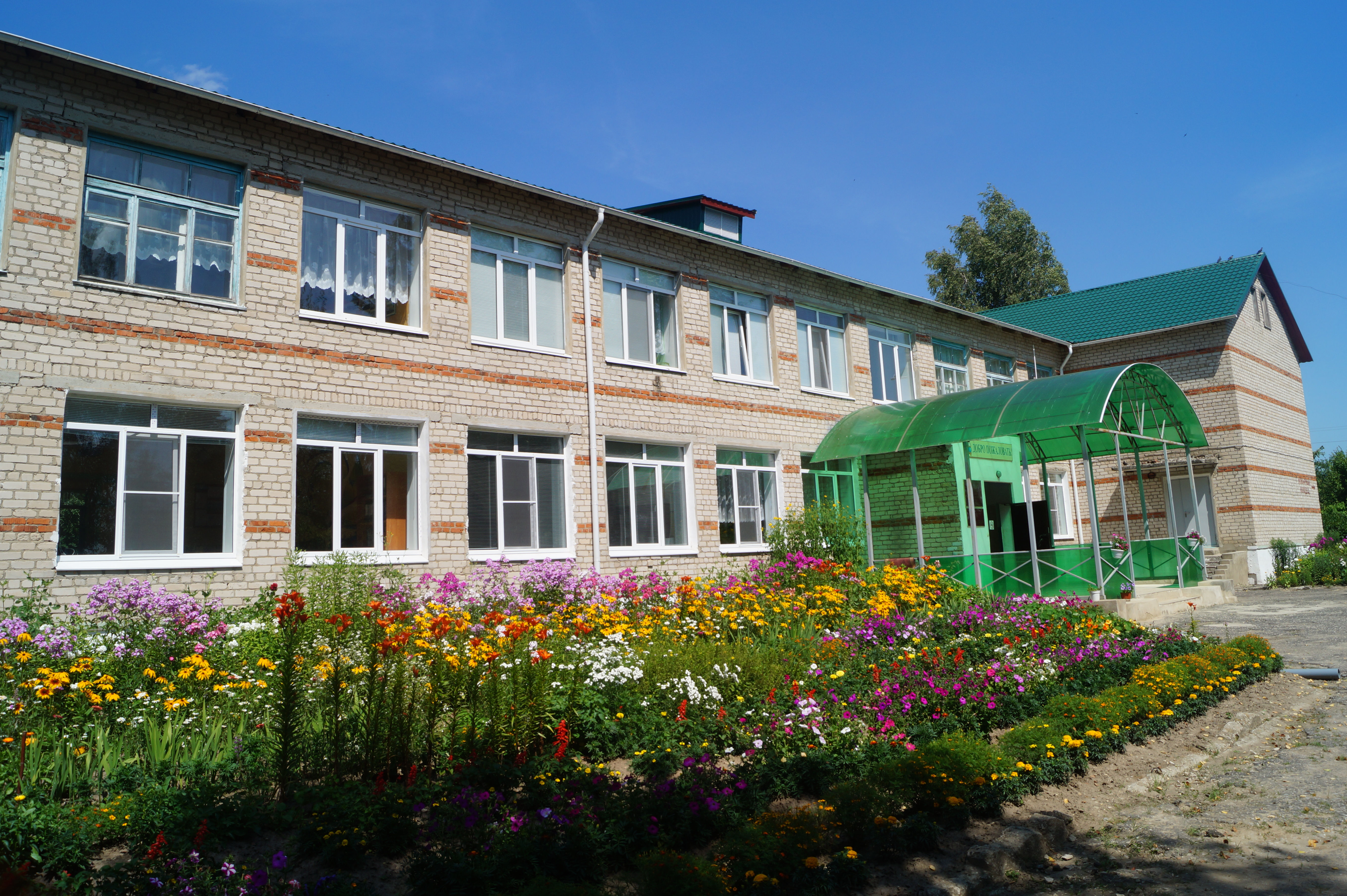 Вёртненская школа